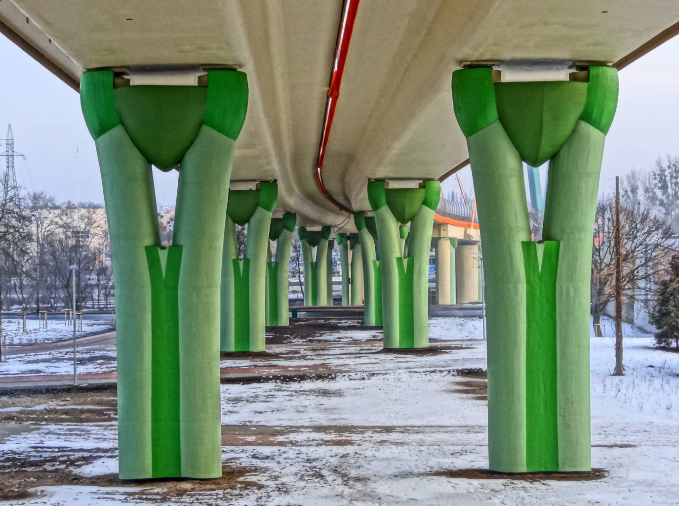 Trasa Uniwersytecka w Bydgoszczy